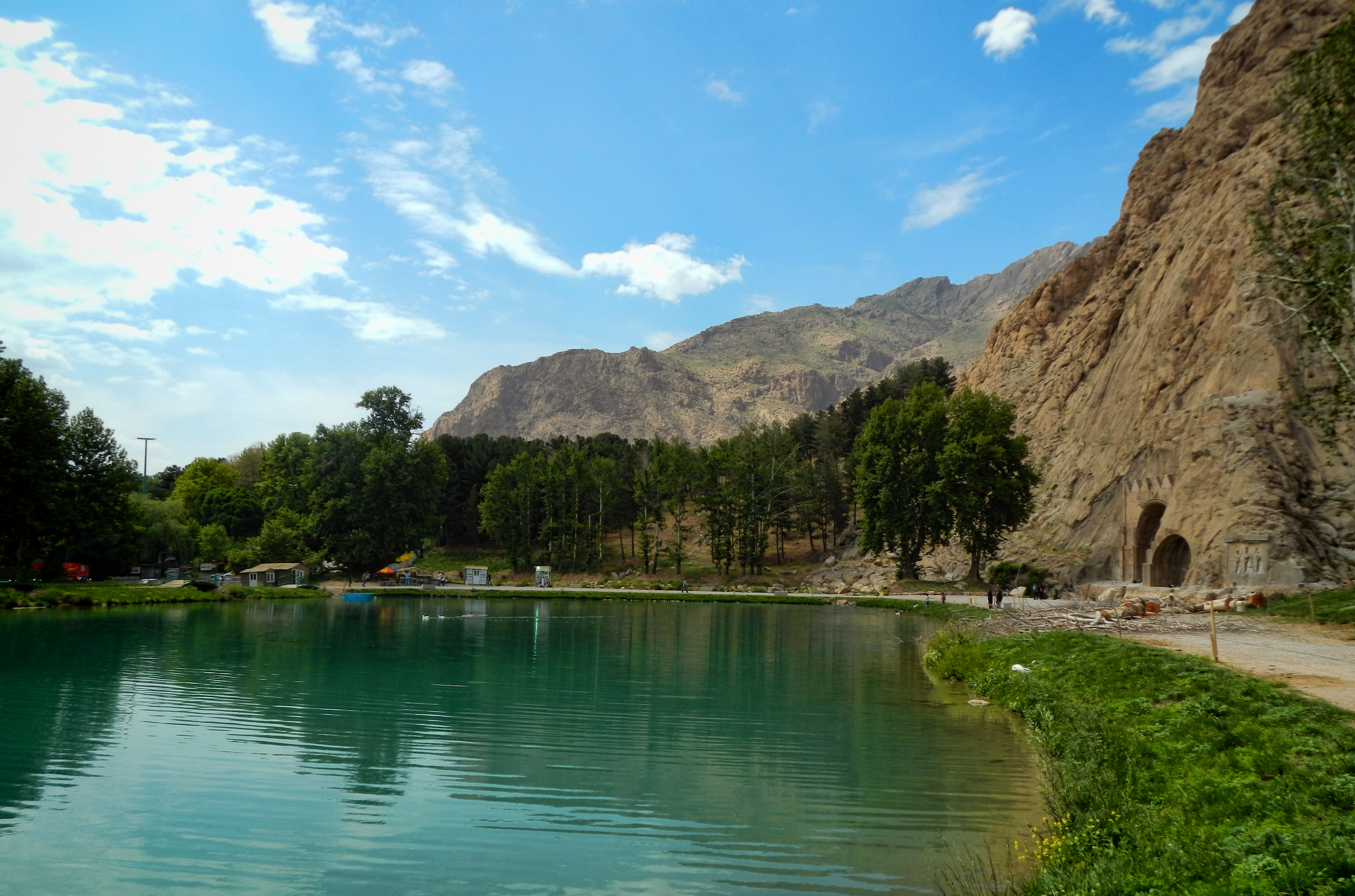 a panorama of Taq-e-Bostan